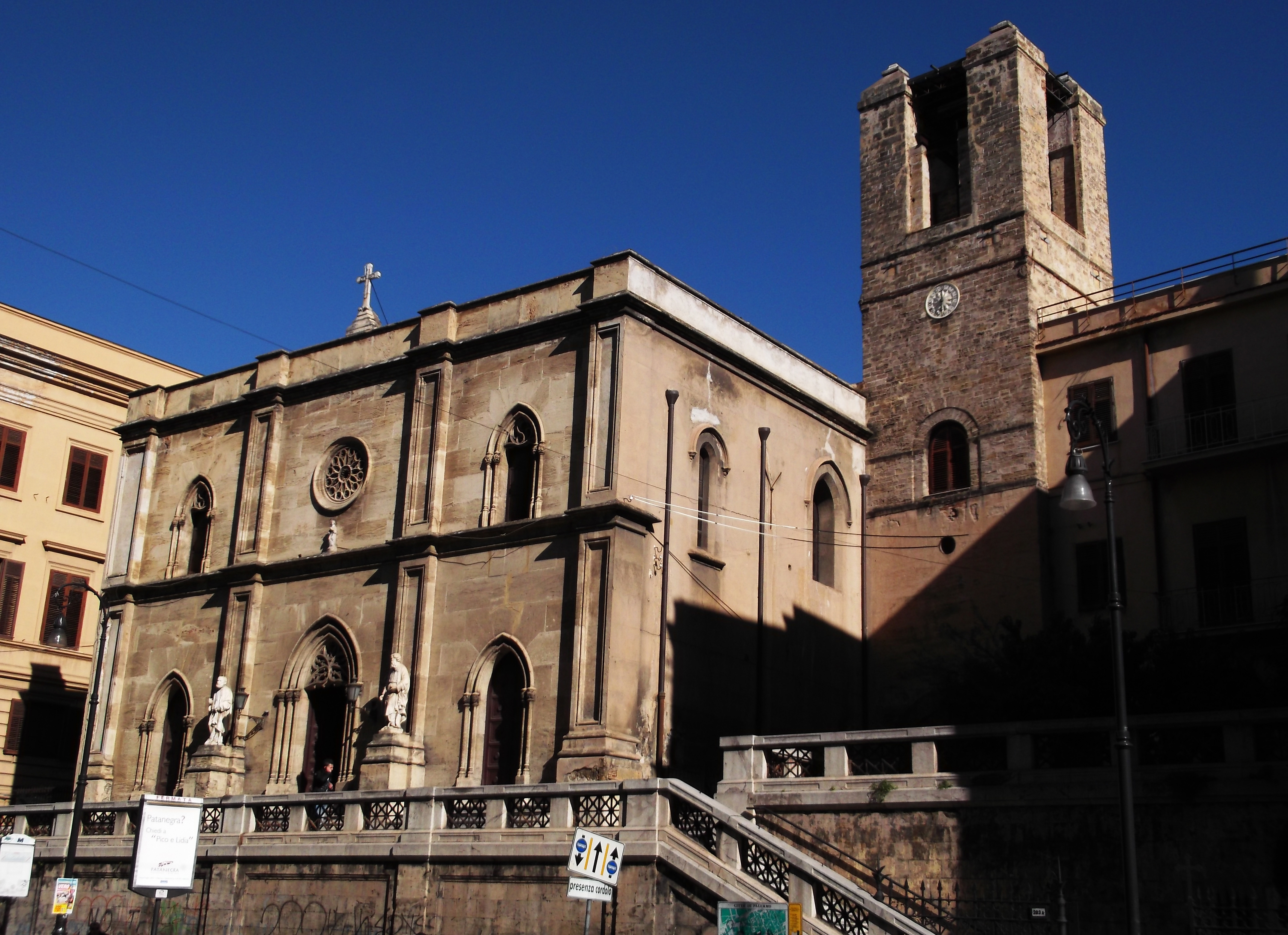 Facciata